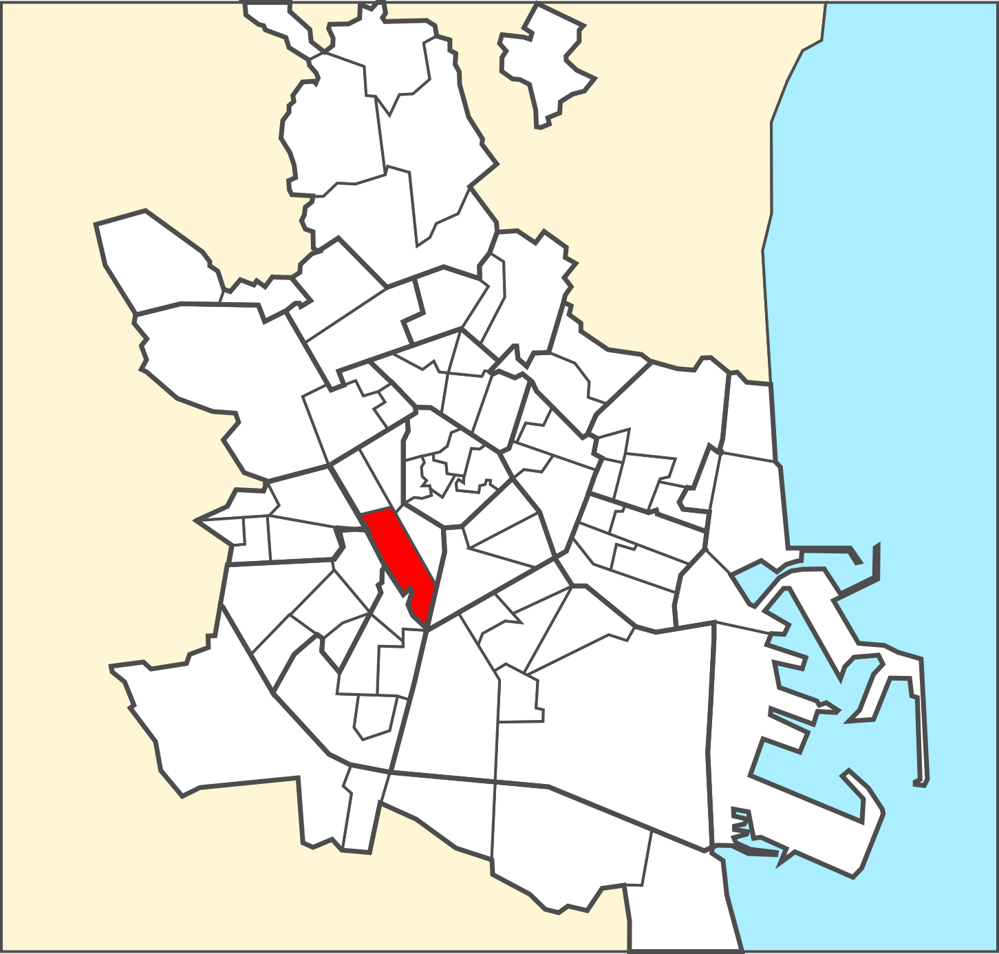 Localització del barri dins de la ciutat de València.